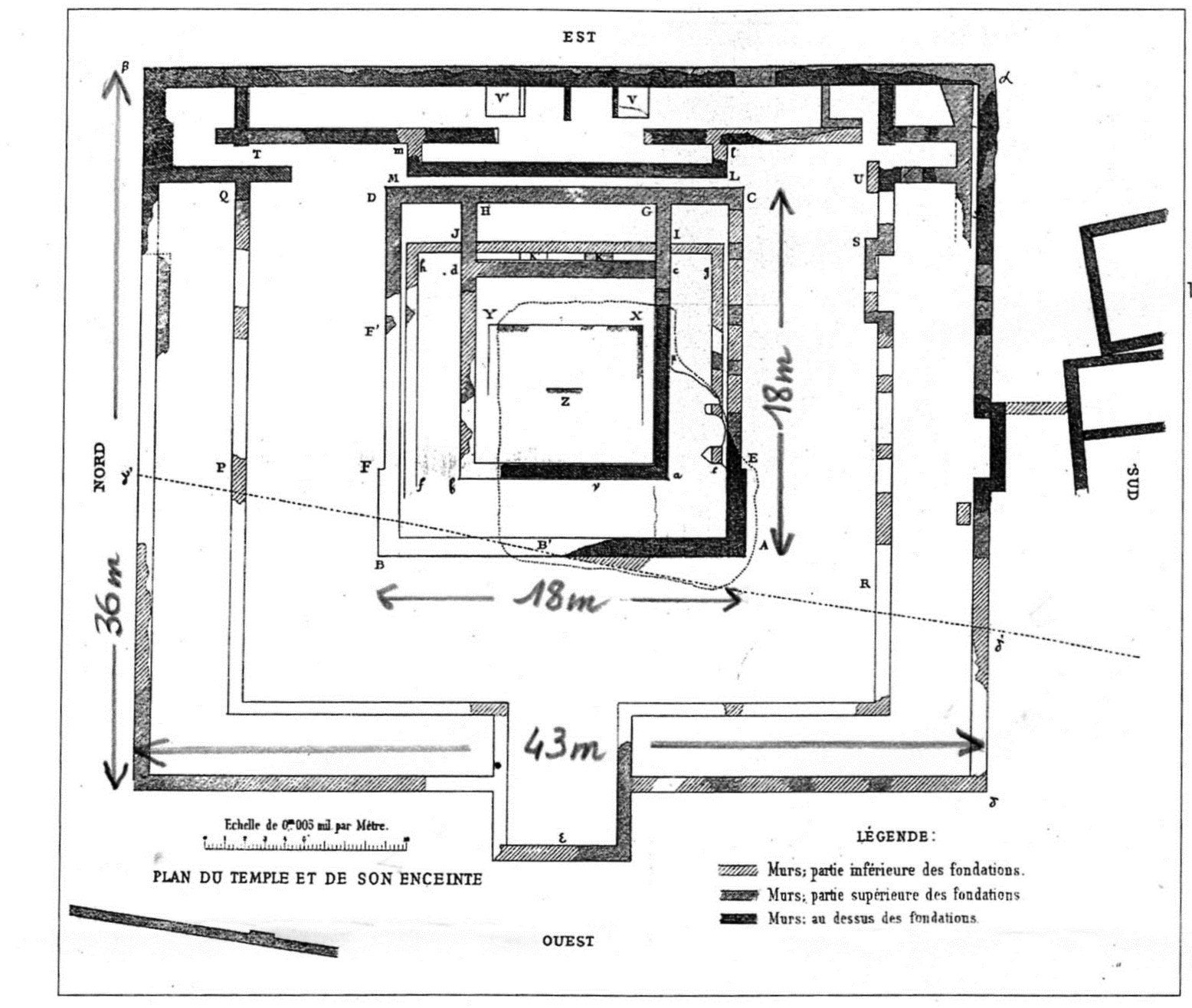 Saint-Désirat détail